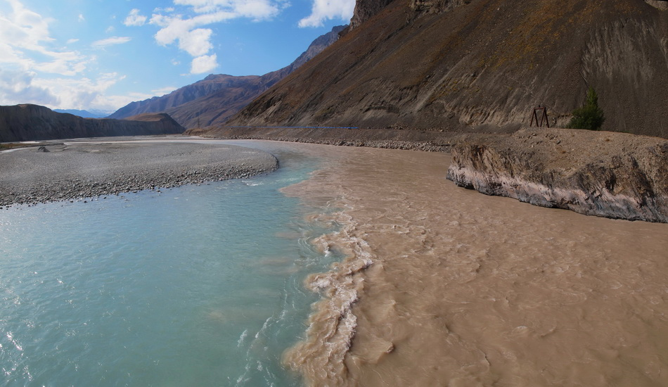 شروع رود سرخاب از اتصال دو رود مک سو و قزل سو